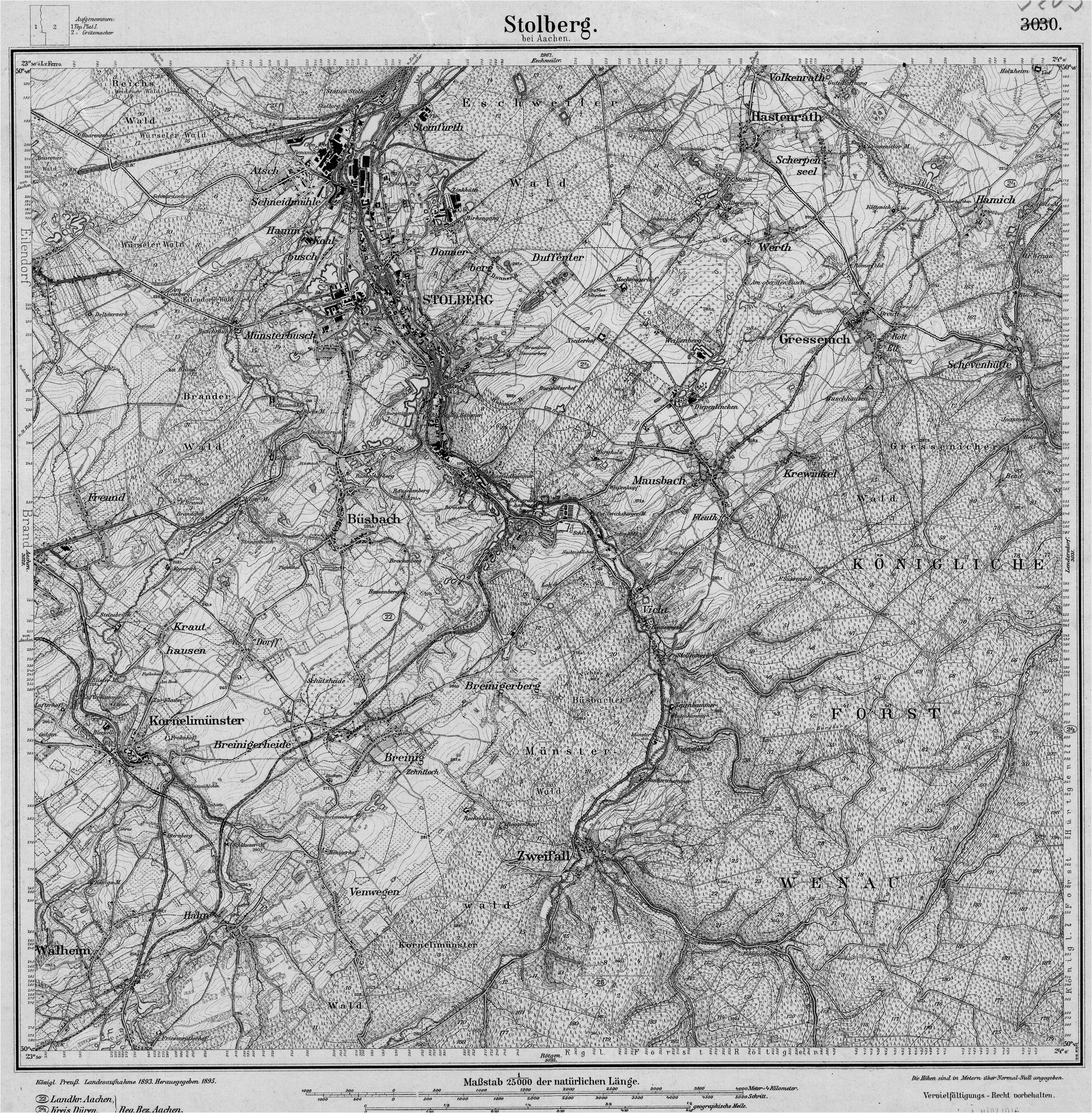 Königl.Preuß.Landesaufnahme 1893 - 1910, Stolberg Rhld.